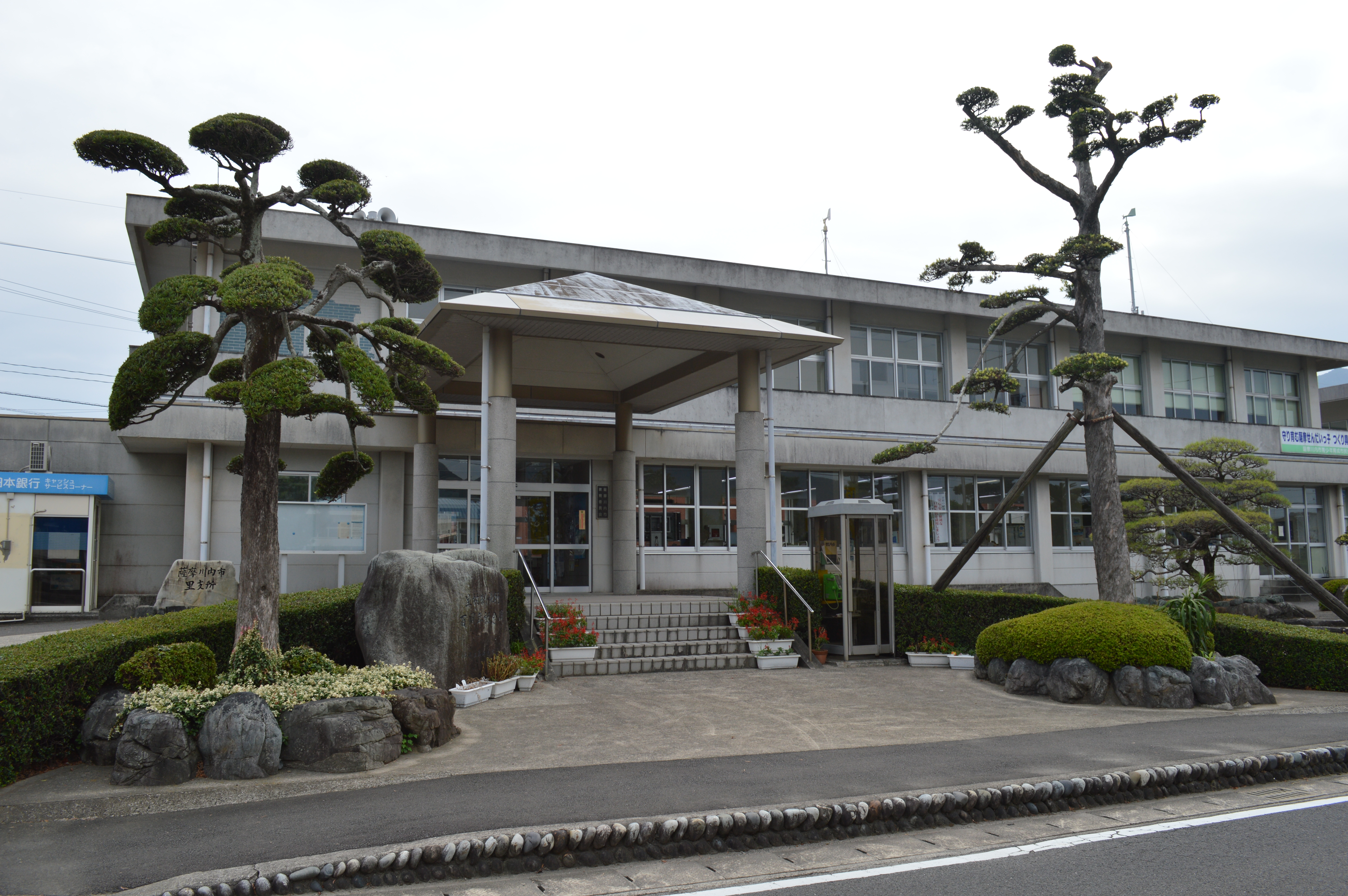 鹿児島県薩摩川内市の上甑島、薩摩川内市役所里支所